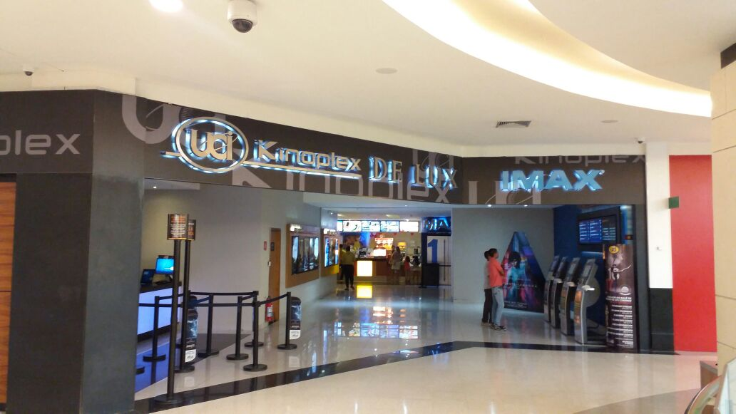 Entrada do UCI Kinoplex DeLux Shopping Recife